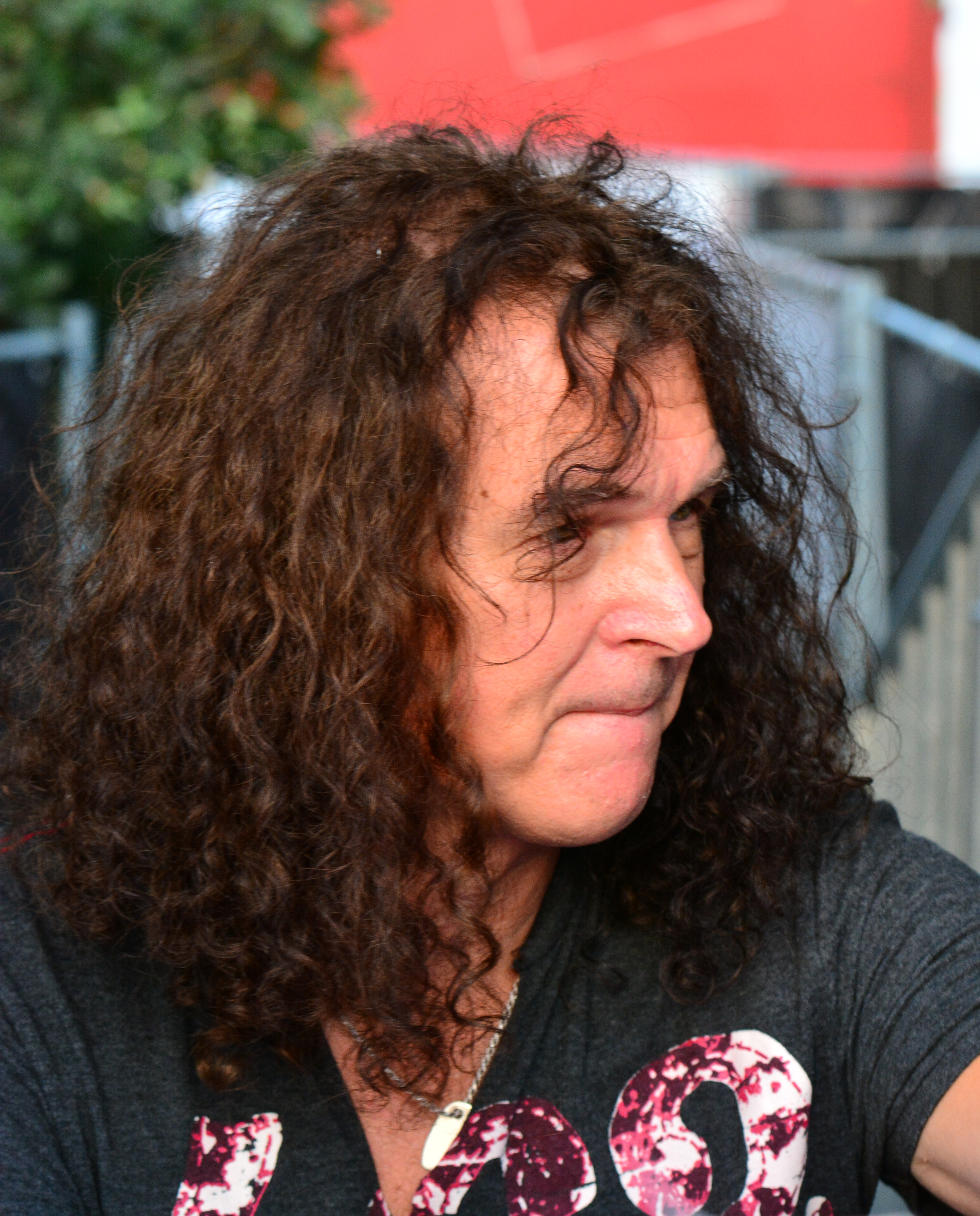 Peter Baltes von Accept beim Meet & Greed auf dem Wacken Open Air 2014